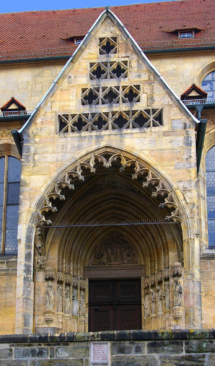 Bamberg - Obere Pfarre - Brautportal